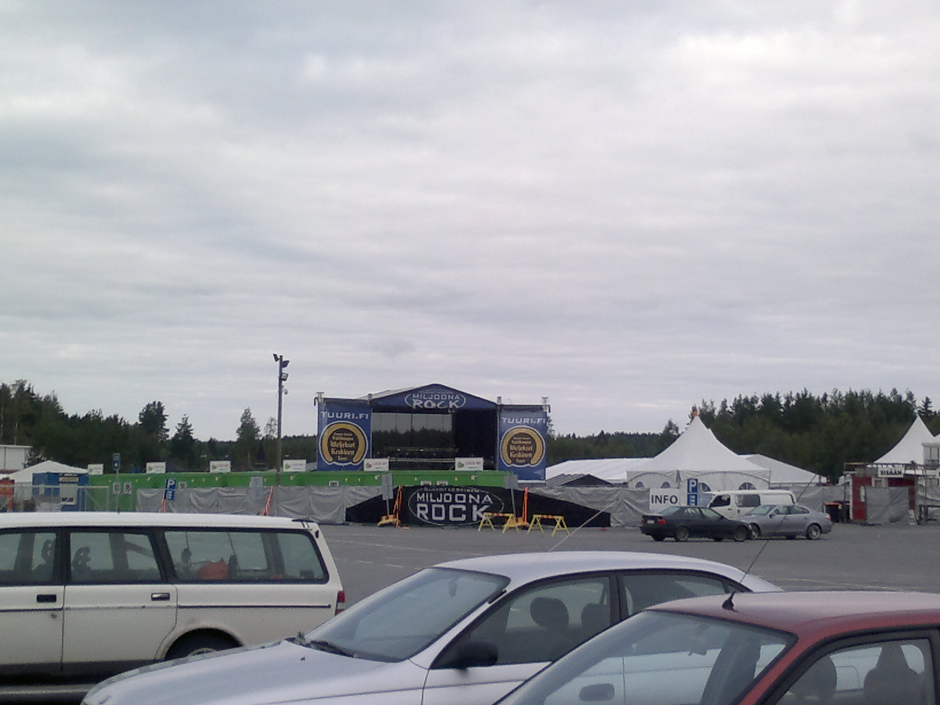 Lava valmiina Miljoona Rockia varten elokuussa 2012.